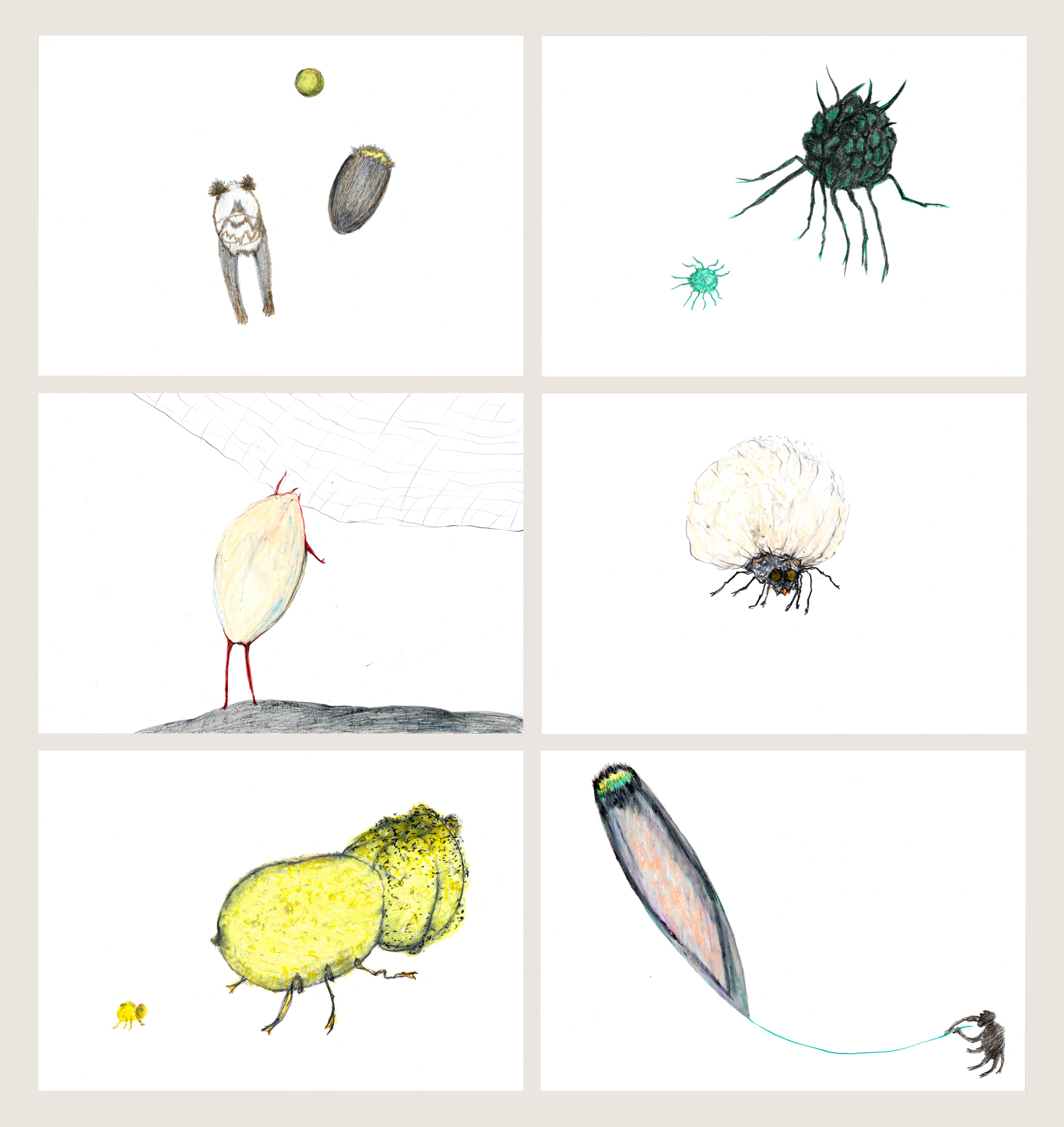 Barbara Isabella Bauer-Heusler, "Tagebuchblätter", 2014/2015, Zeichnungen auf DIN A 4-Papier